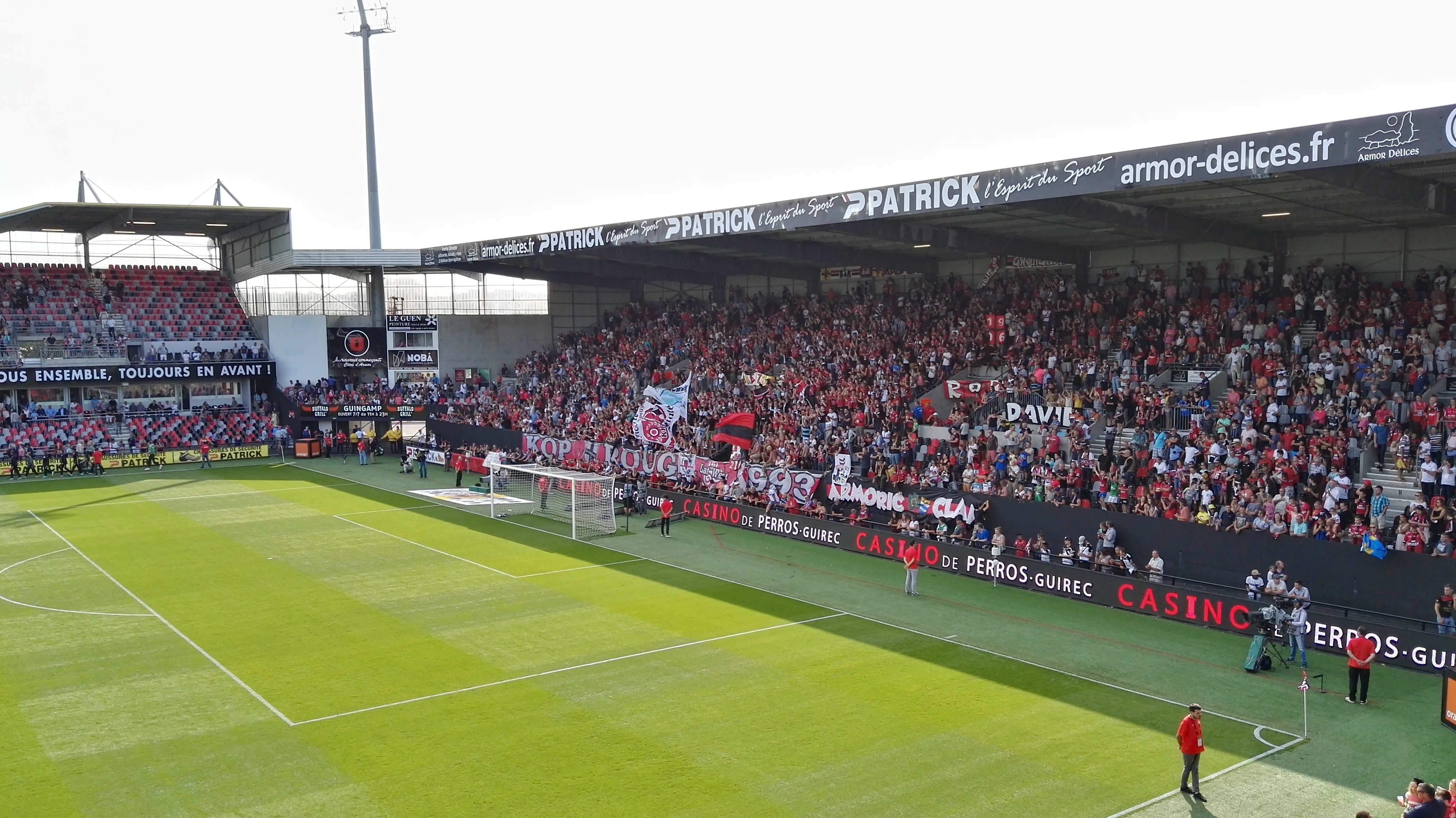 Tribune Patrick